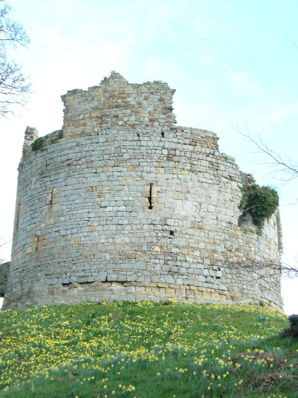 Hawarden Castle keep, Hawarden, Flintshire